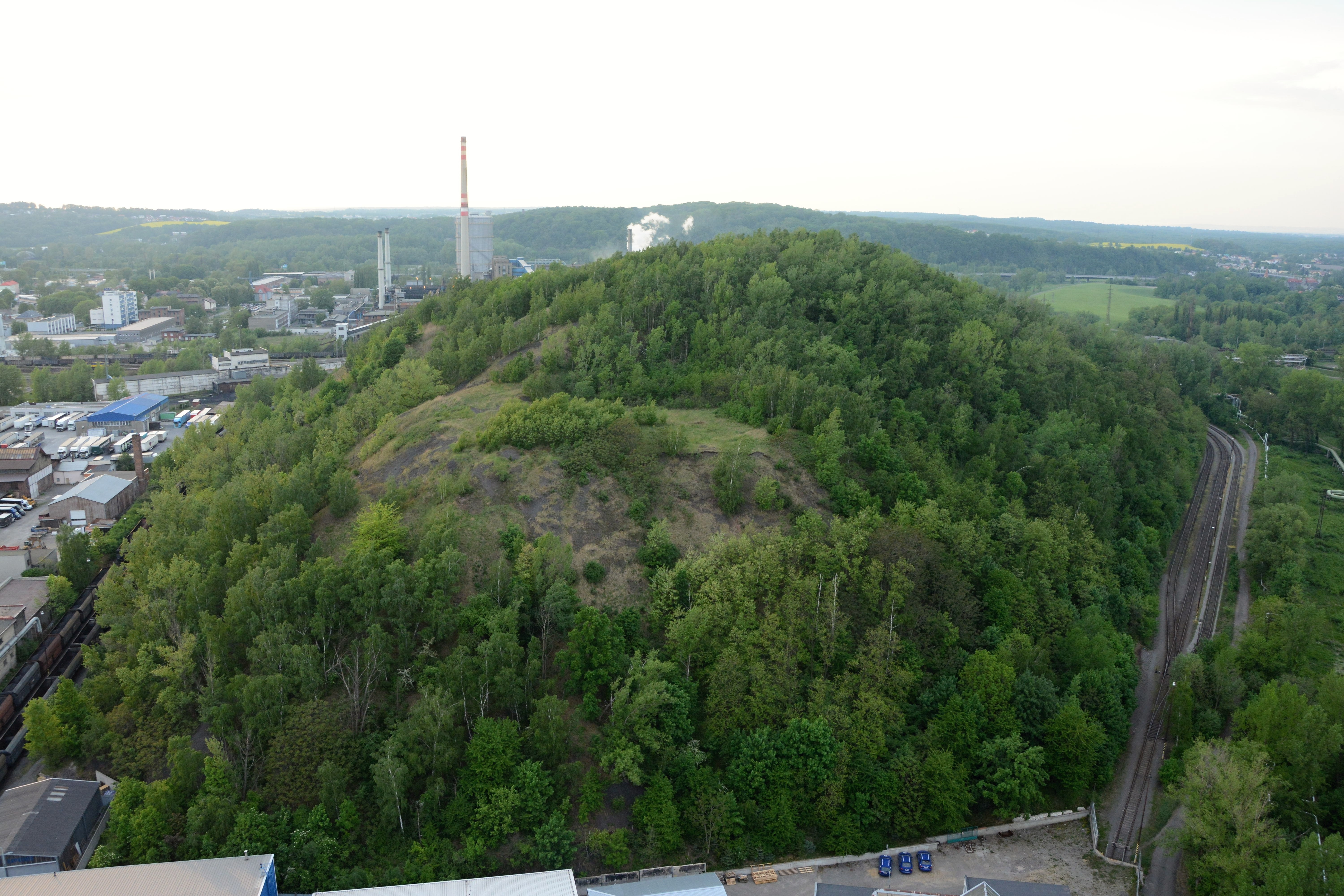 Halda Dolu Odra, Ostrava-Přívoz